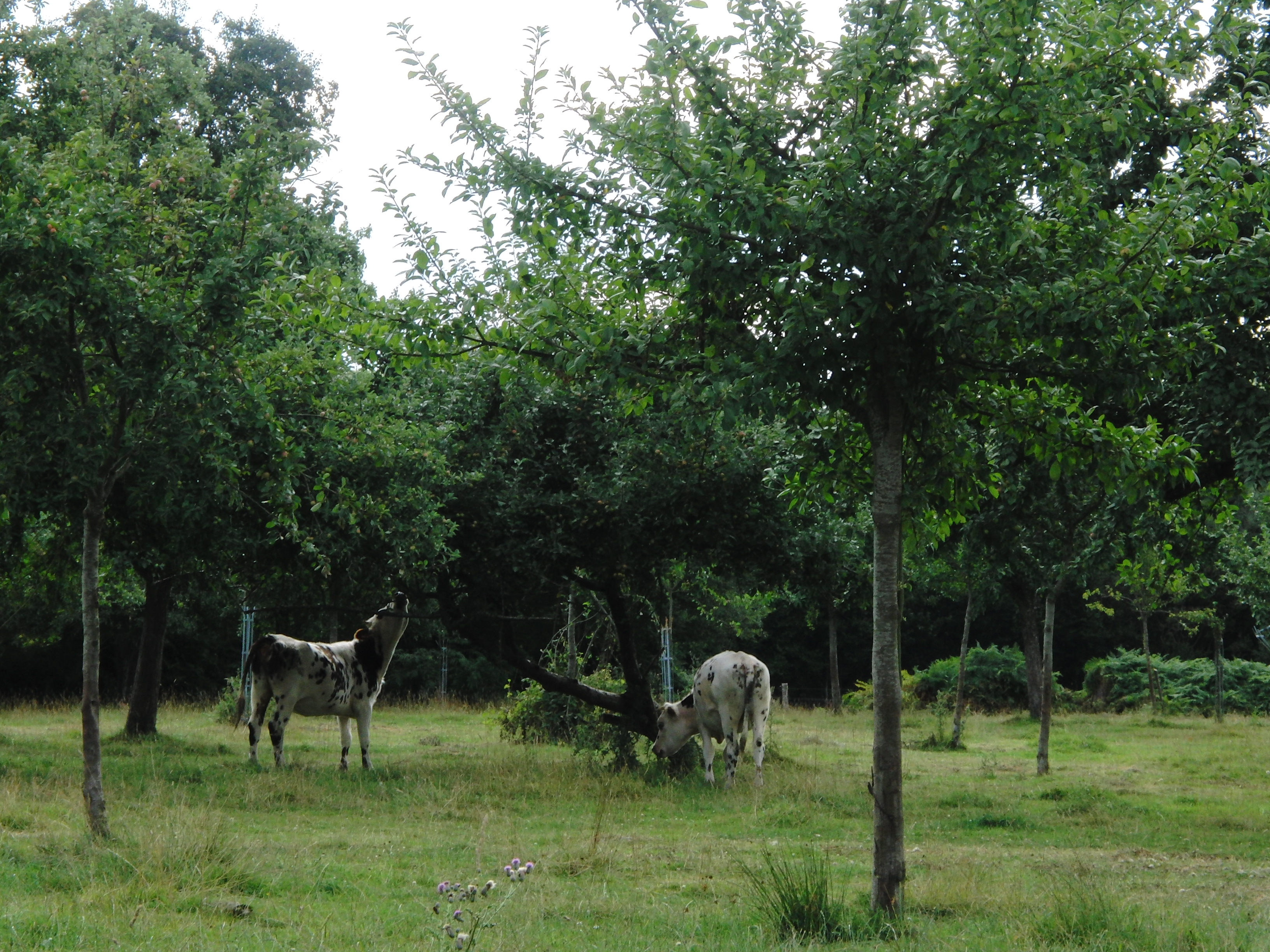 Deux jeunes vaches normandes au milieu des pommiers, Dompierre, Orne, France